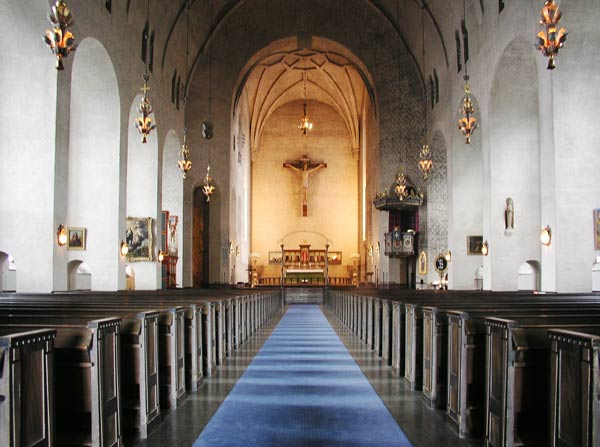 Högalidskyrkan, Södermalm, Stockholm. Huvudskeppet.